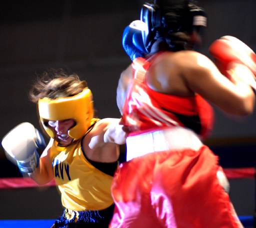 US-Amateurboxerinnen in Kalifornien, 2006